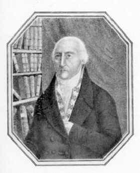 Johann Josef Nehr, český lékař